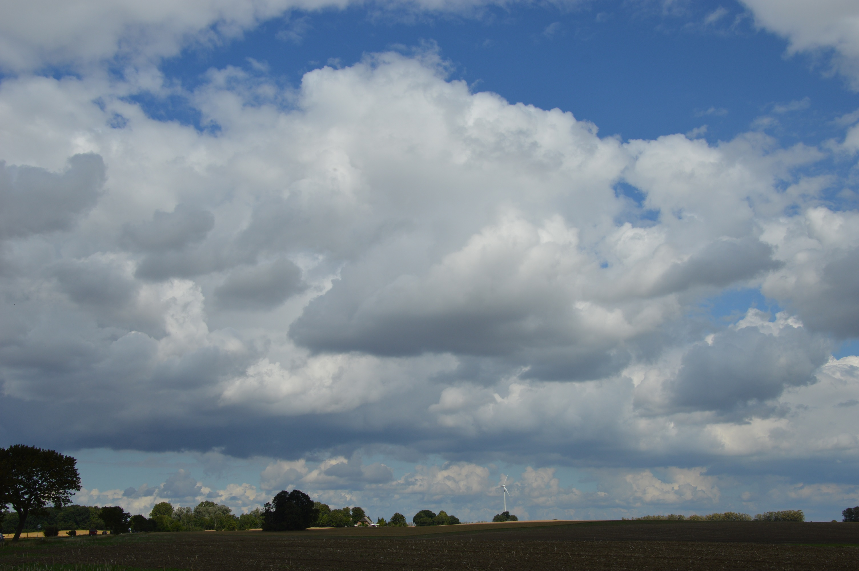 Das Bild wurde nahe dem Chausseehause Puddemin aufgenommen. Es zeigt den Ort, an dem das untergegangene Dorf Günz gelegen hat.